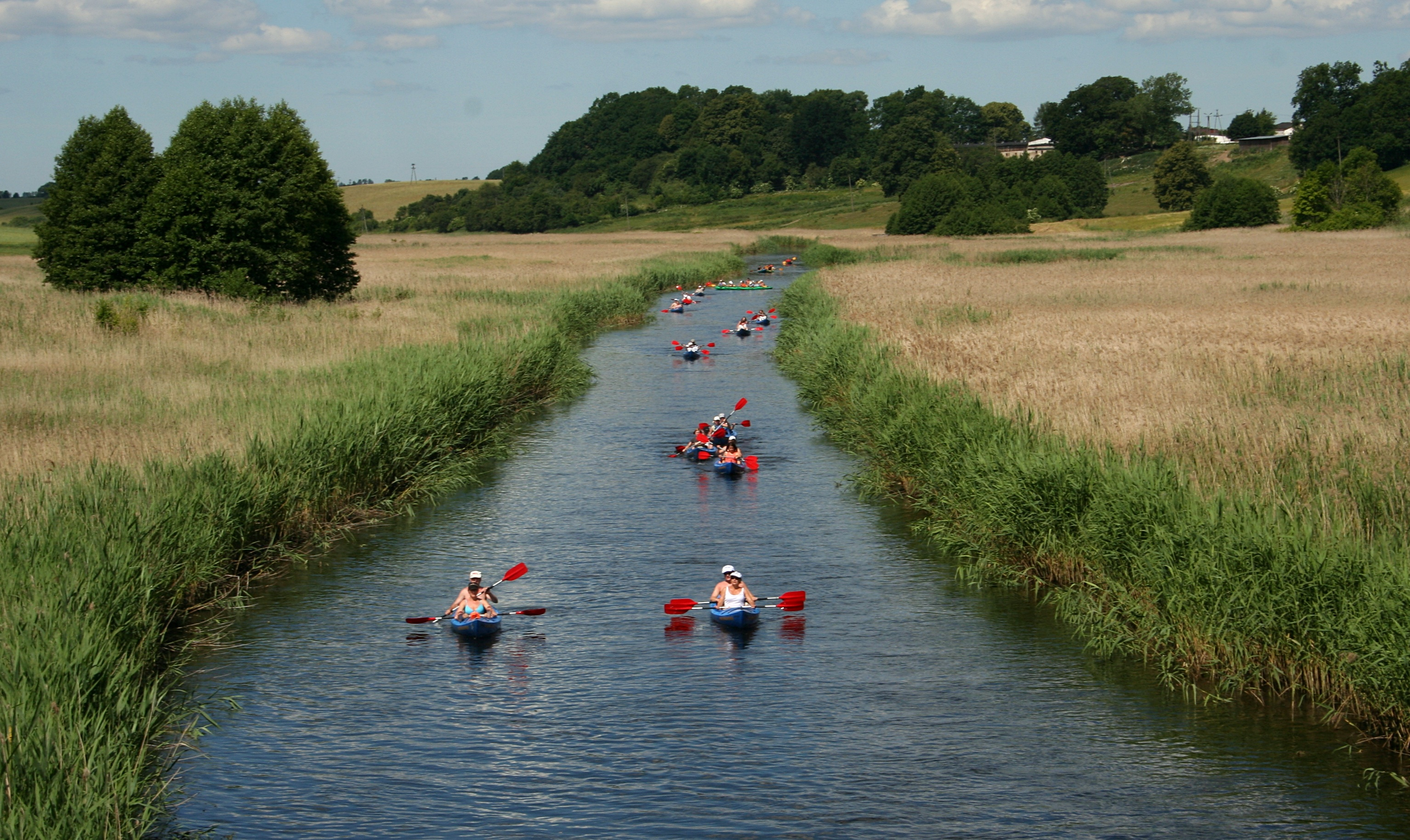 spływ kajakowy na Brdzie. W dali miejsocowść Konarzynki